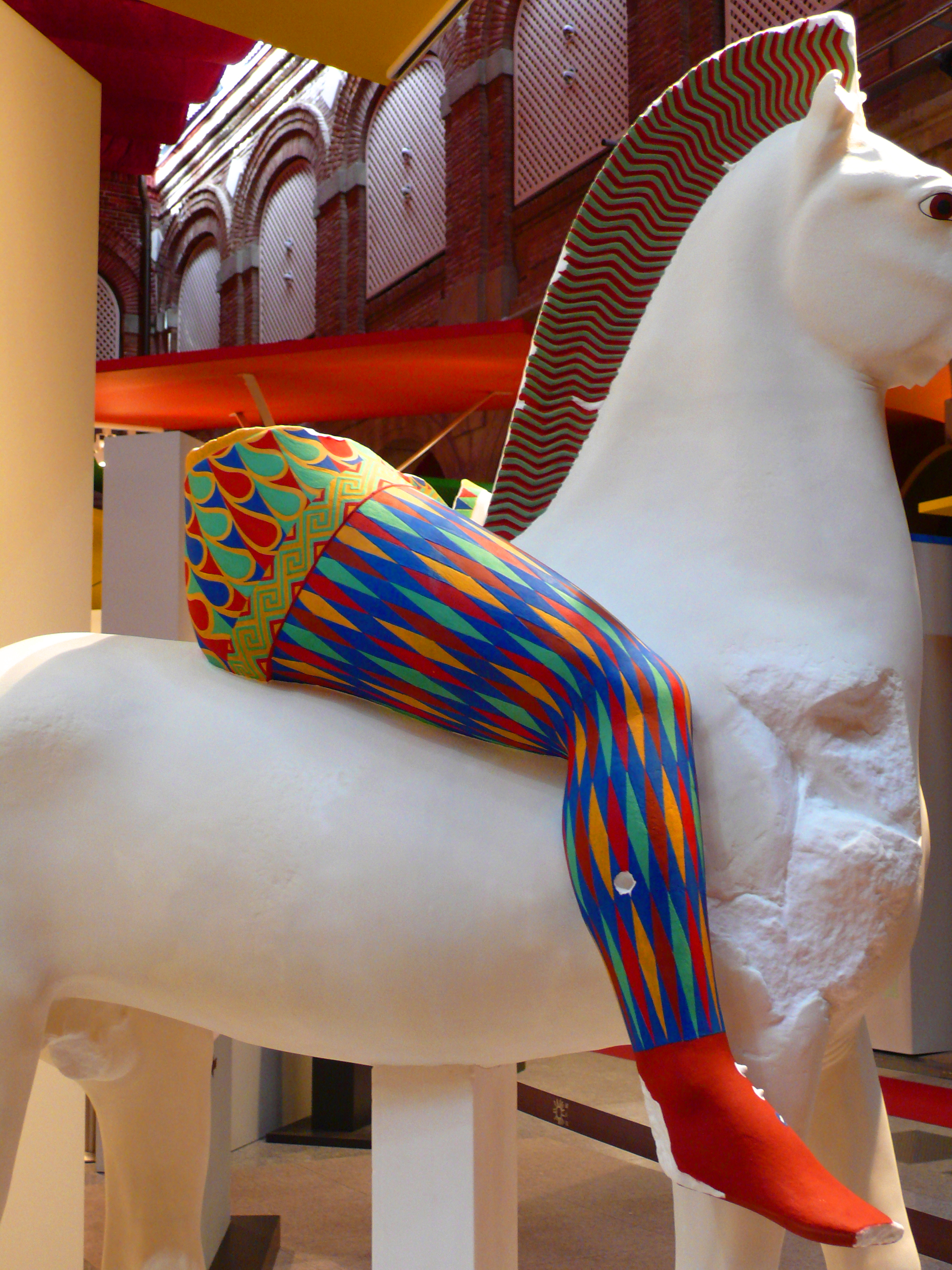 Reconstrucción en color del llamado "Jinete Persa" de la Acrópolis de Atenas. El original (ca. 490 a. e.), en mármol, está en el Museo de la Acrópolis de Atenas. Exposición "El color de los dioses", Alcalá de Henares, 2010.